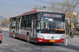 拍摄于北京市海淀区香山南路